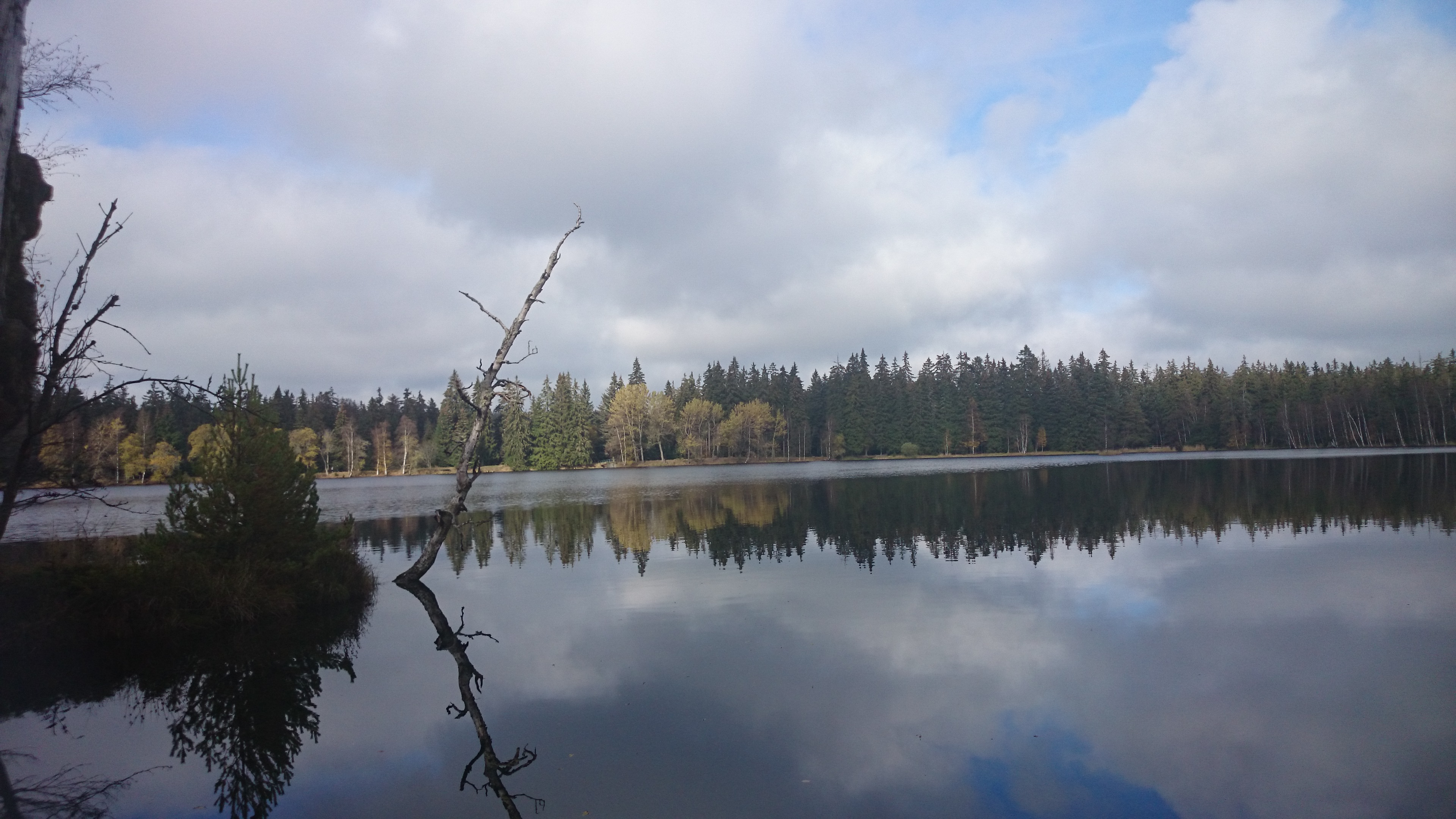 Plní rybolovnou funkci